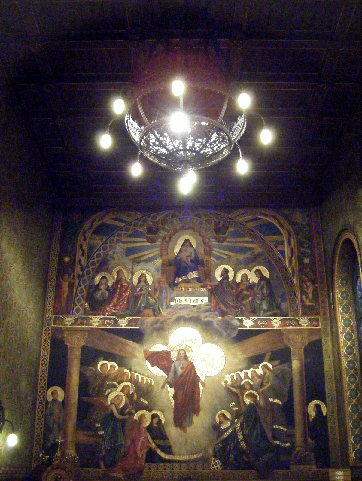 Pázmáneumi kapelle